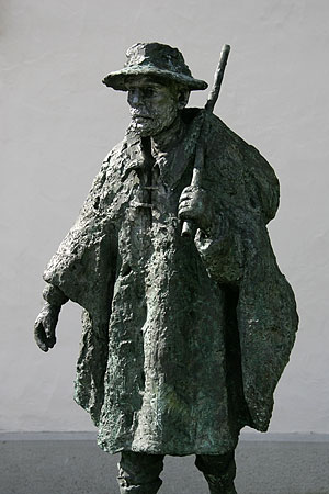 Skulptur beim Luzernertor in Sempach